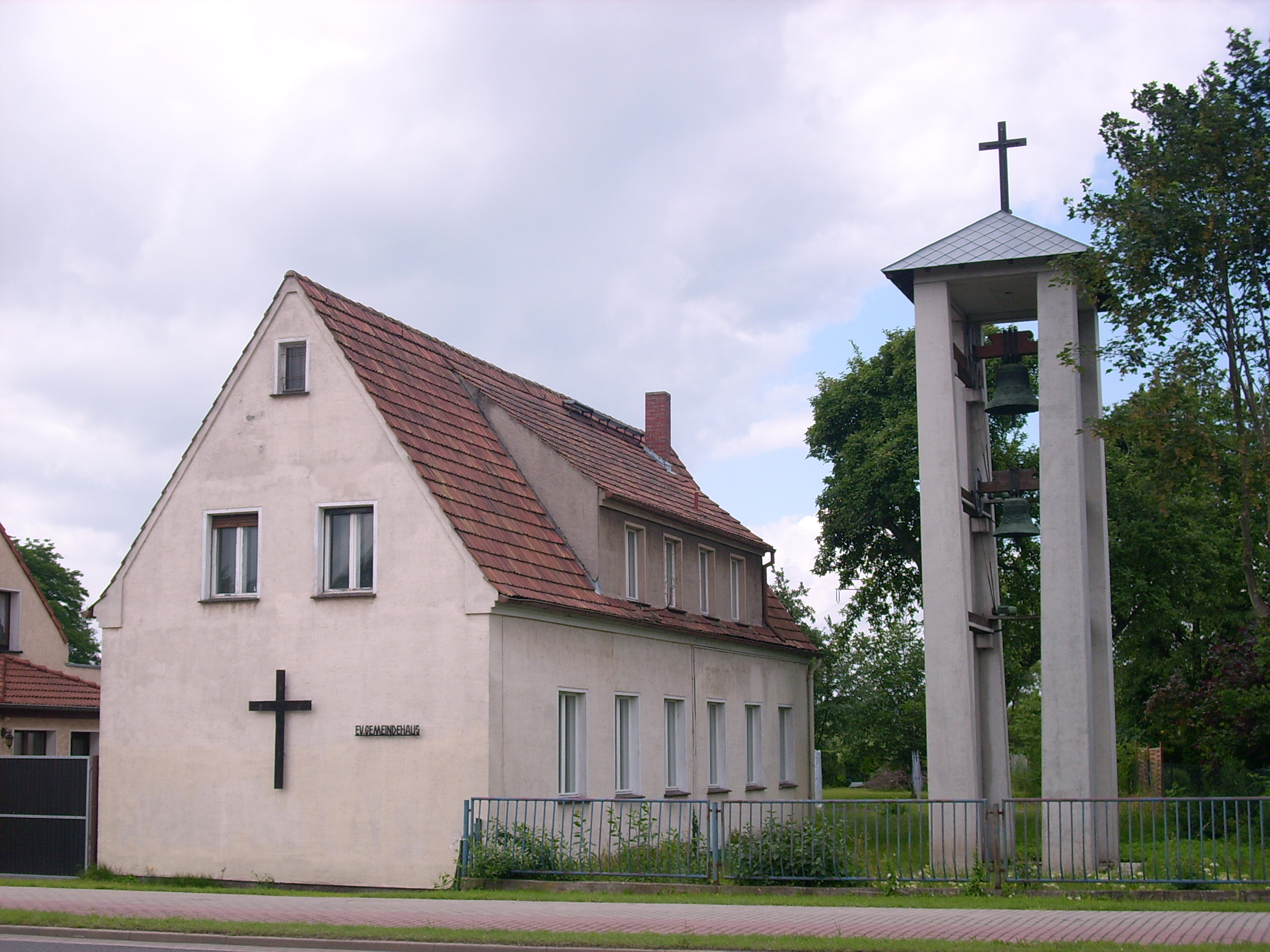 Evangelisches Gemeindehaus an der Dresdener Chaussee in Schwarze Pumpe, Ortsteil von Spremberg